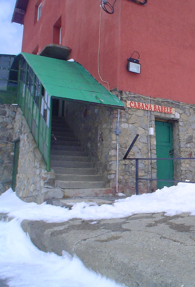 Babele - intrare